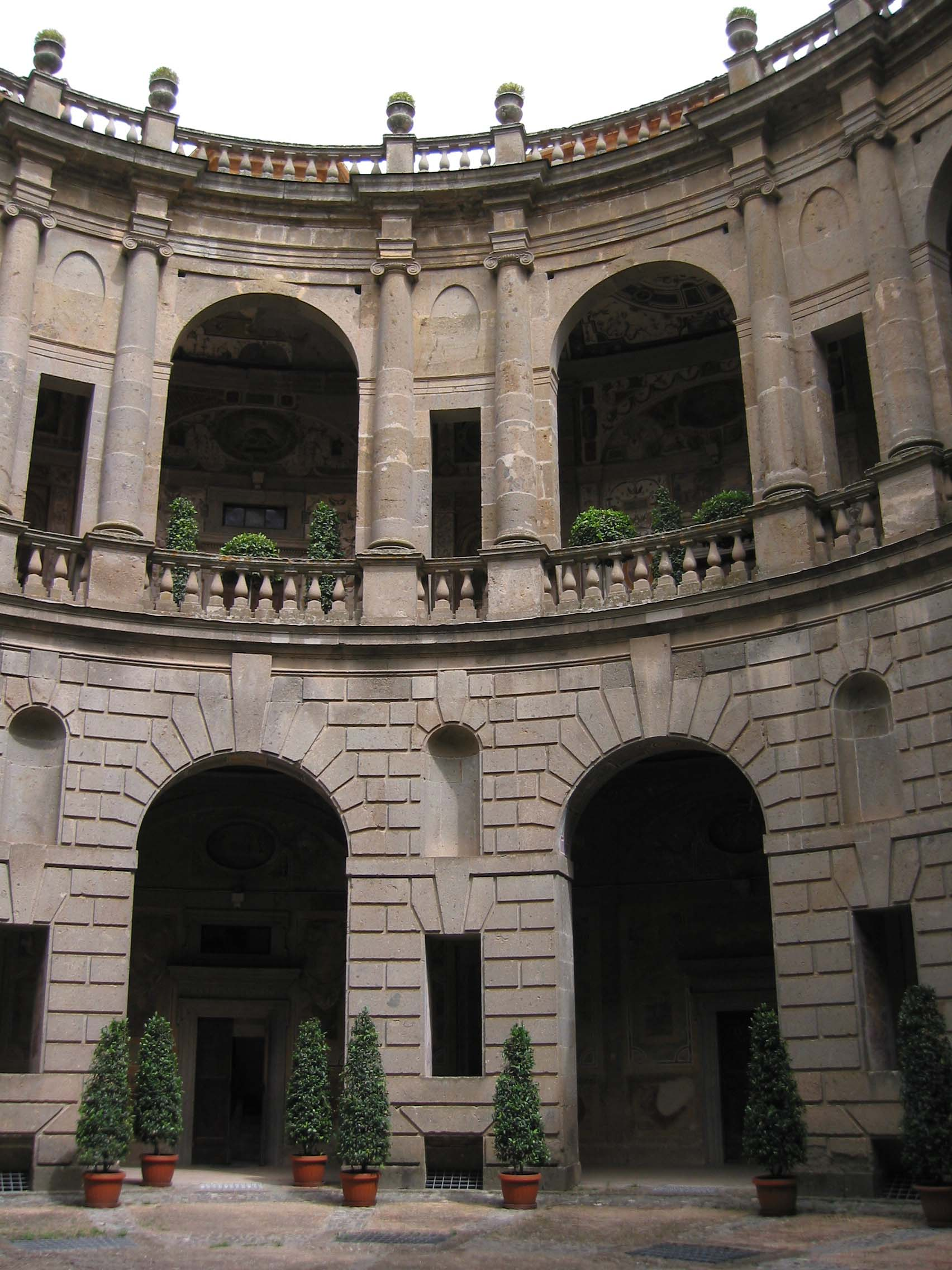 Rundhof